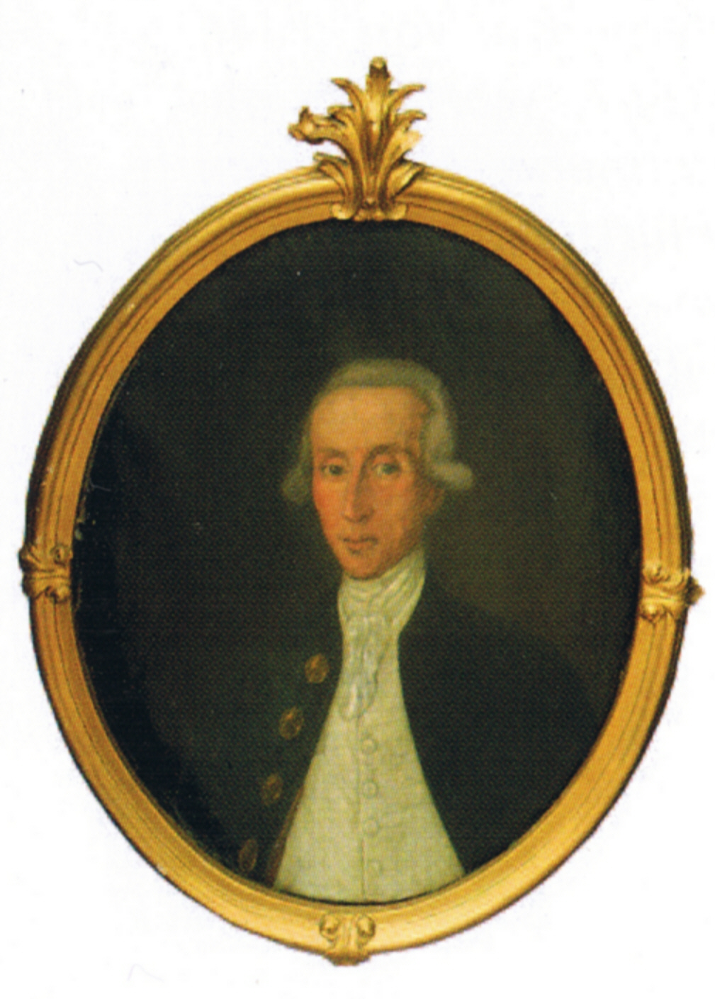 Conrad Christoph Graf von Ahlefeldt, Erb- und Gutsherr Ascheberg, Kammerherr, Land- und Obergerichtsrat in Glückstadt, Probst des Klosters in Uetersen